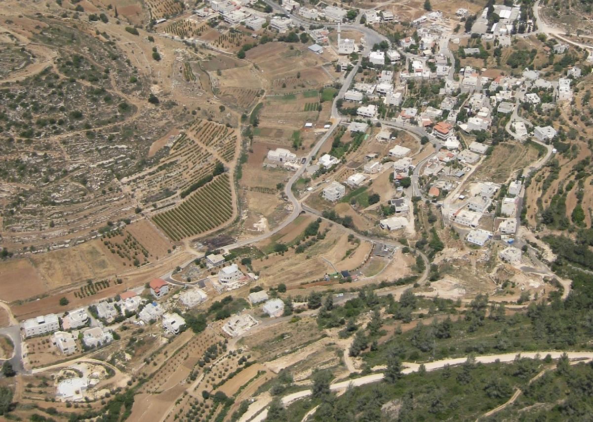 צילום אויר של הכפר עין ראפהEin Rafa in Israel